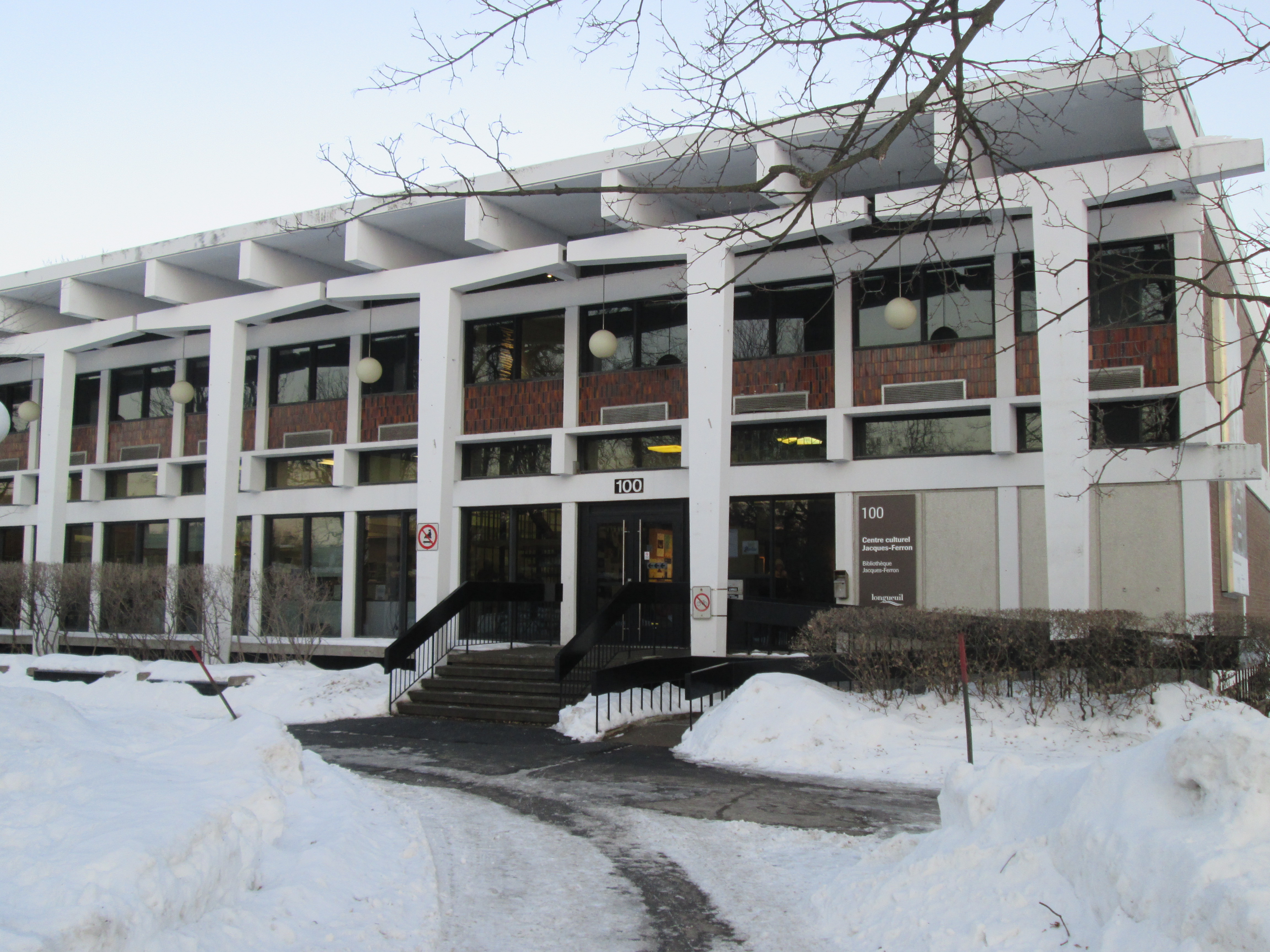 Vue de la Bibliothèque Jacques-Ferron, faisant partie du réseau des bibliothèques publiques de Longueuil (Québec, Canada)